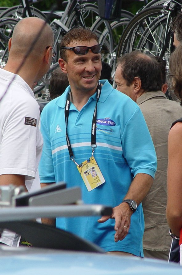 Johan Museeuw 2006 als PR van Quickstep-Inergetic